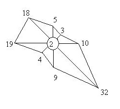 распределение воздушных потоков.